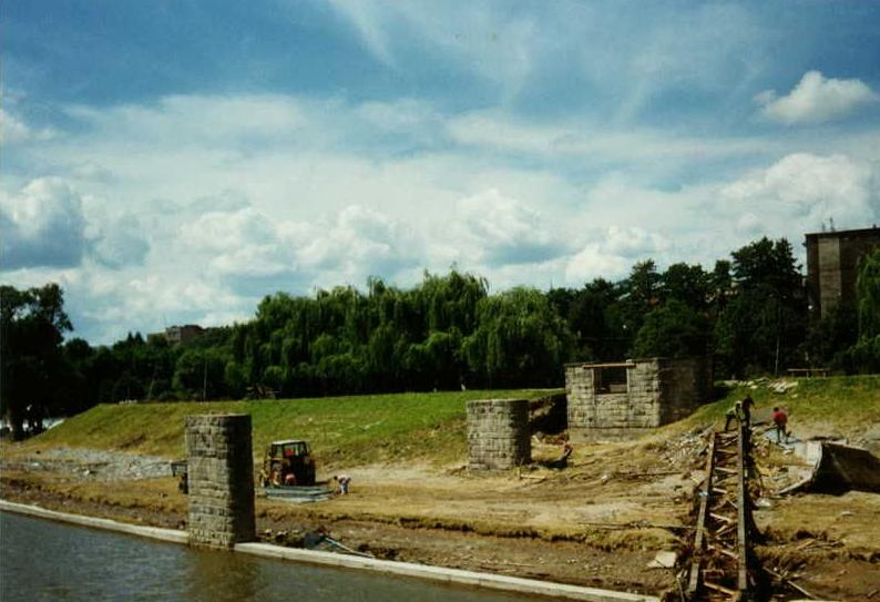 Most przy promenadzie w Kłodzku po powodzi z 1997 roku